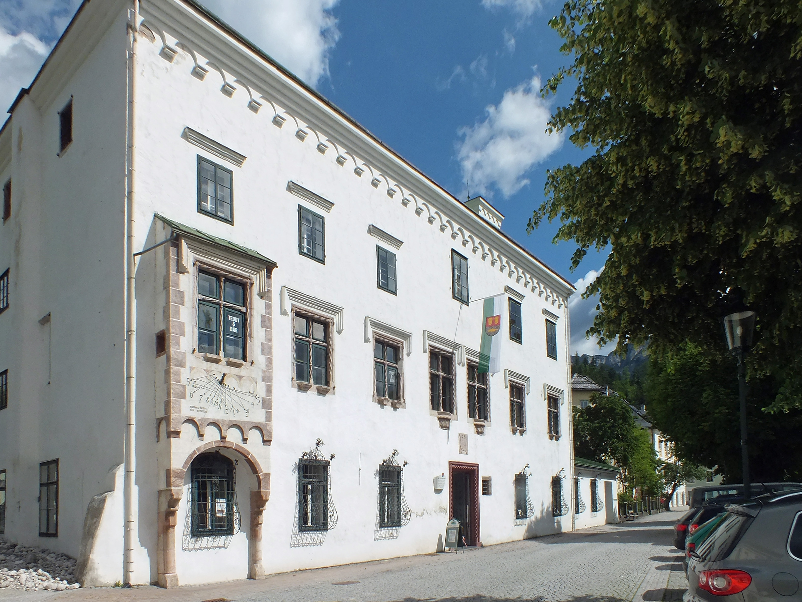 Der Kammerhof in Bad Aussee, jetzt Museum